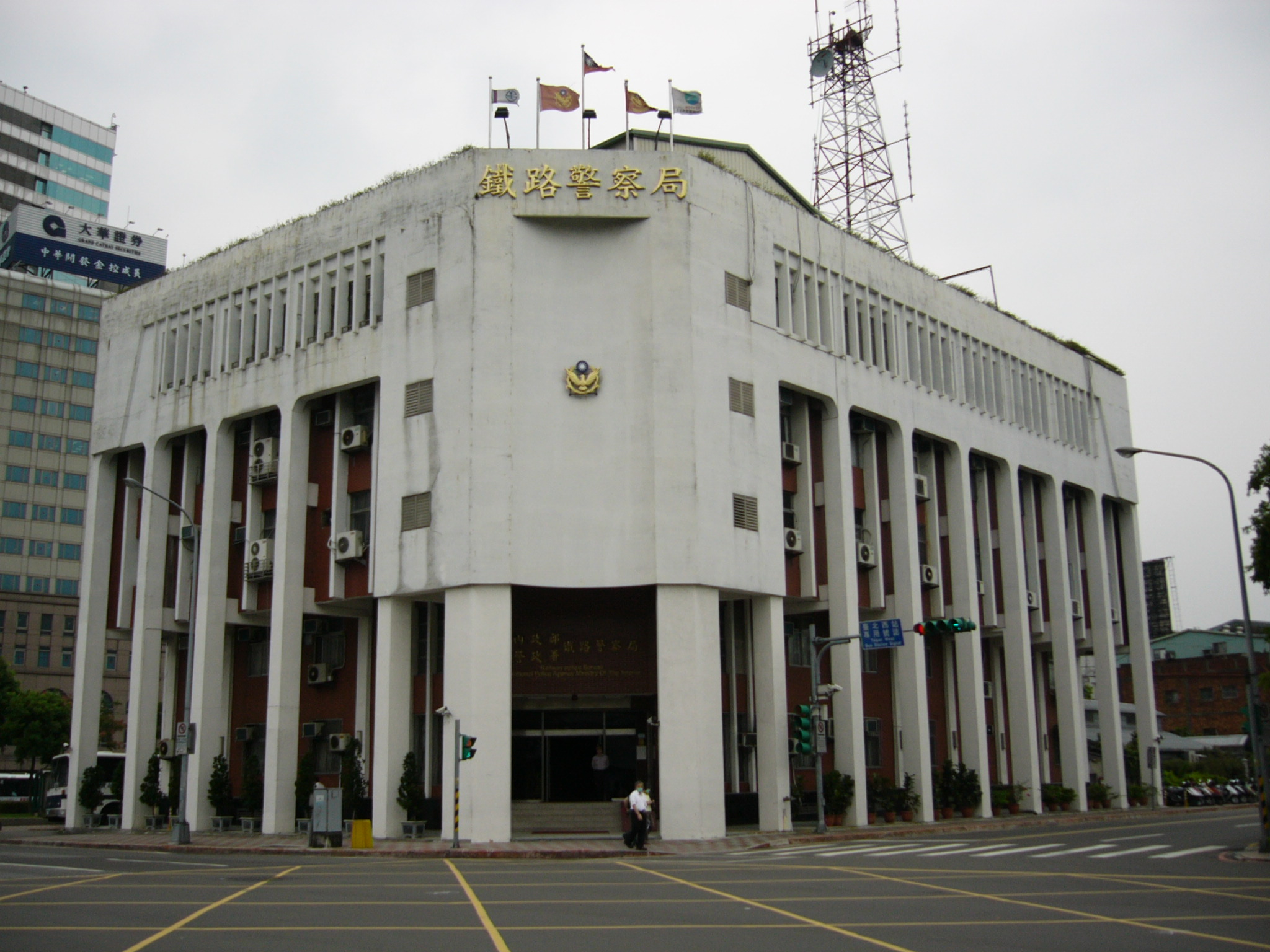 中華民國內政部警政署鐵路警察局本部。